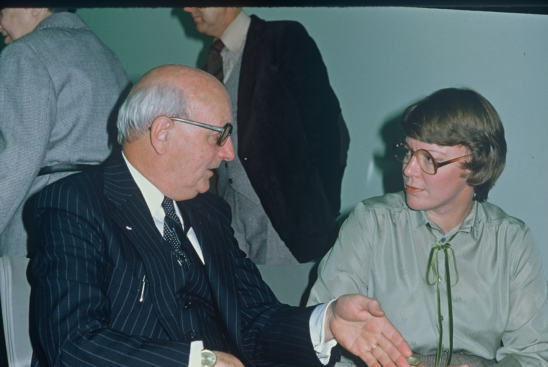 Edward Symoens parolanta kun Eliza Kehlet en Antverpeno, 1978. Propra foto.